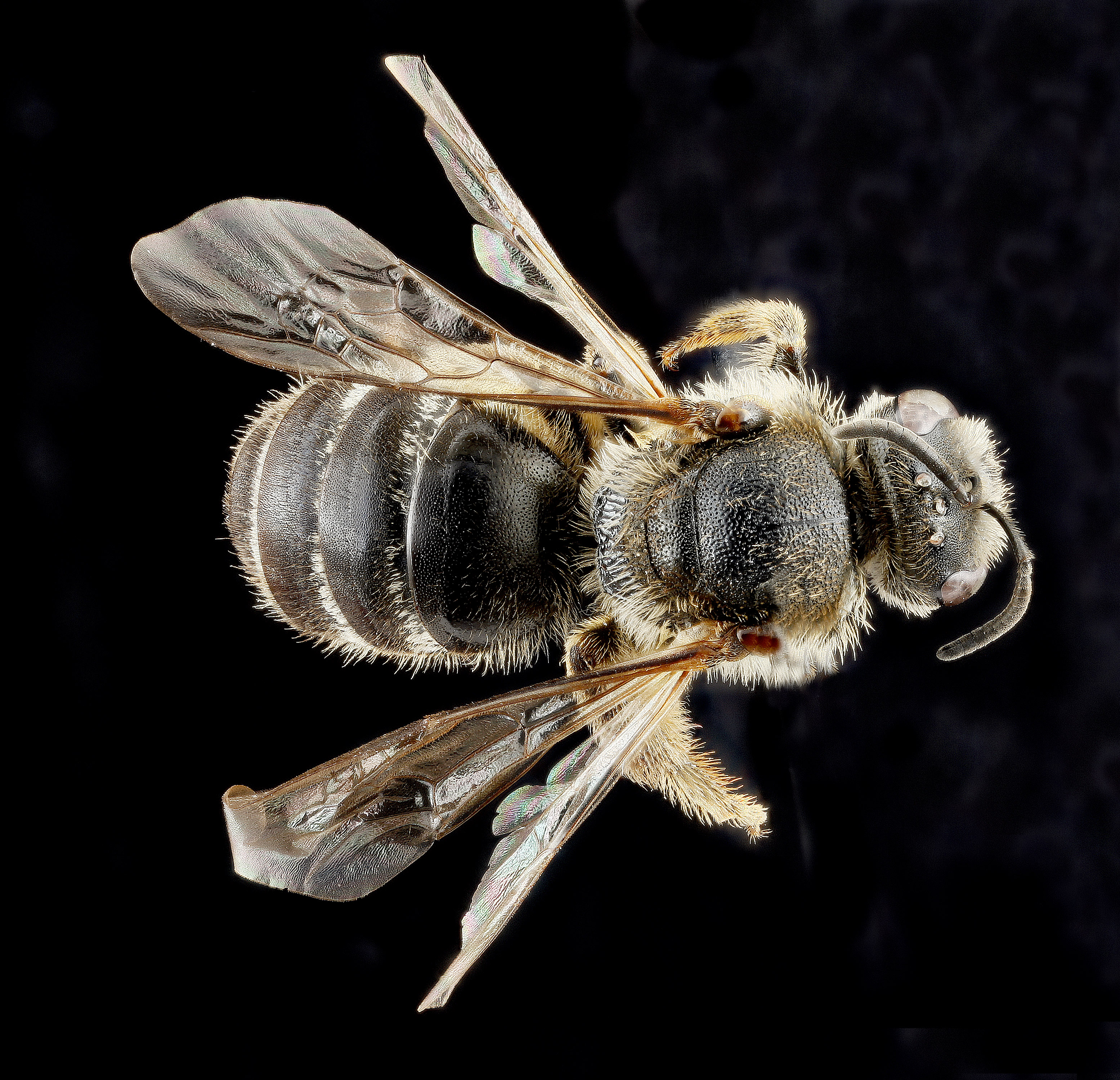 Lasioglossum leucozonium, female